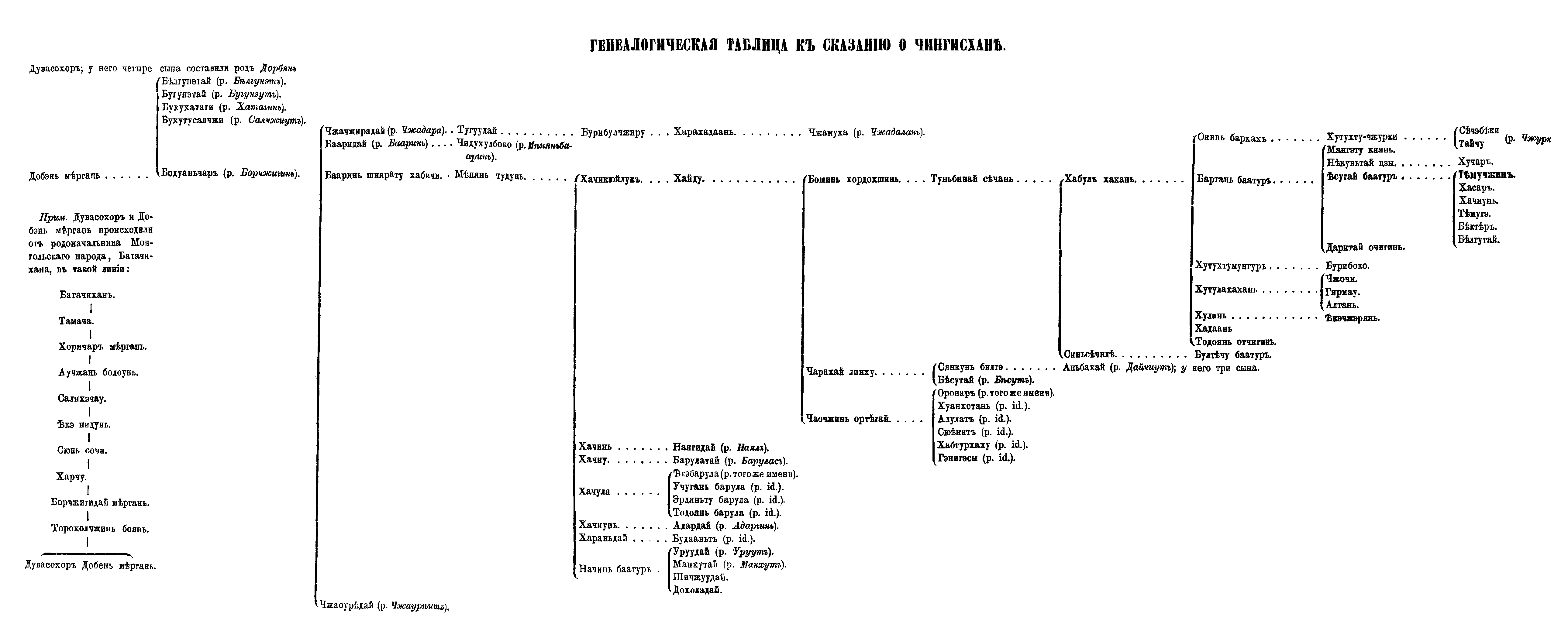 Генеалогическая таблица к «Старинному Монгольскому сказанию о Чингисхане», иллюстрирующая происхождение Чингисхана.